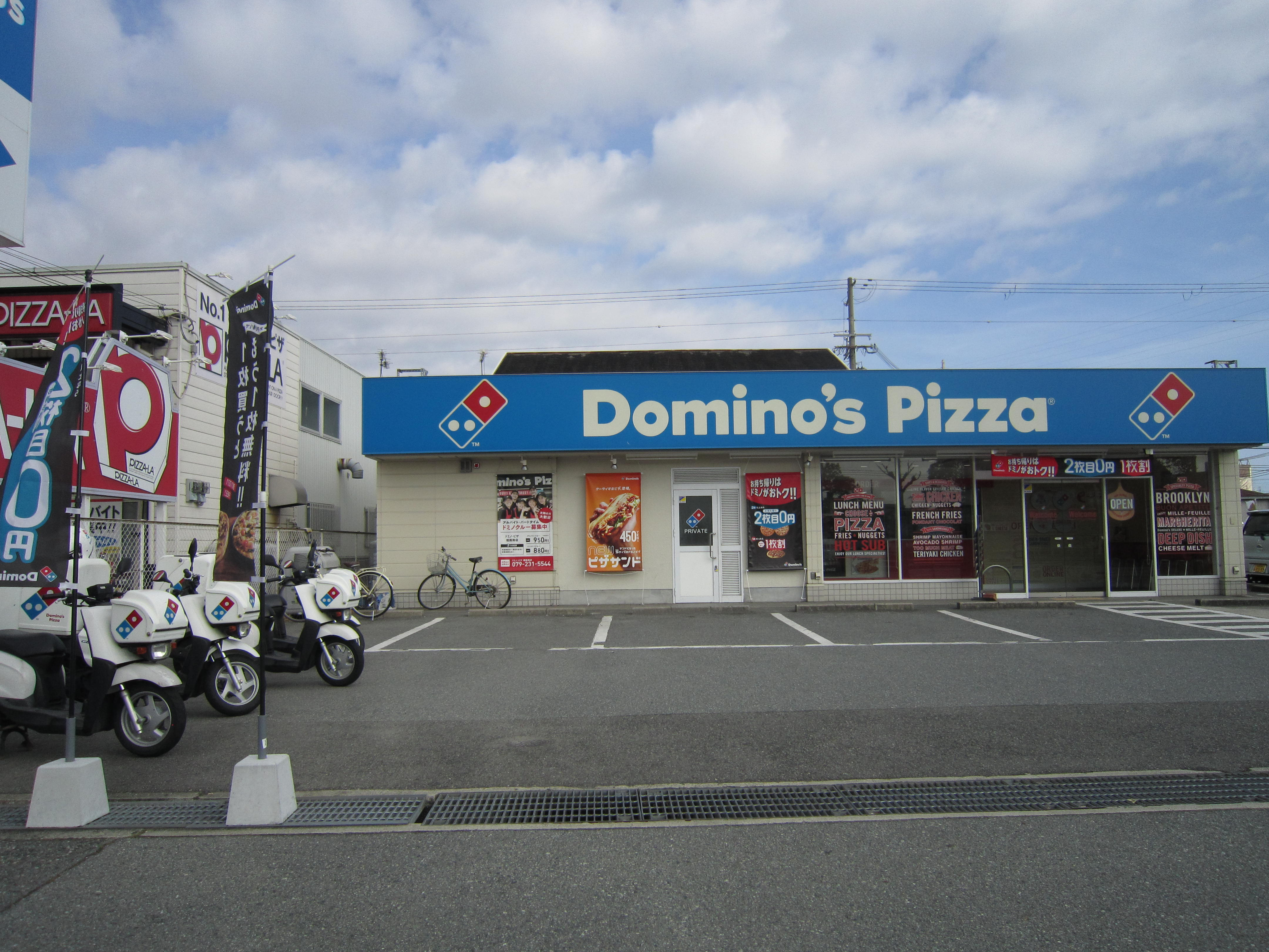 ドミノピザ姫路南店。デリバリーピザショップ。